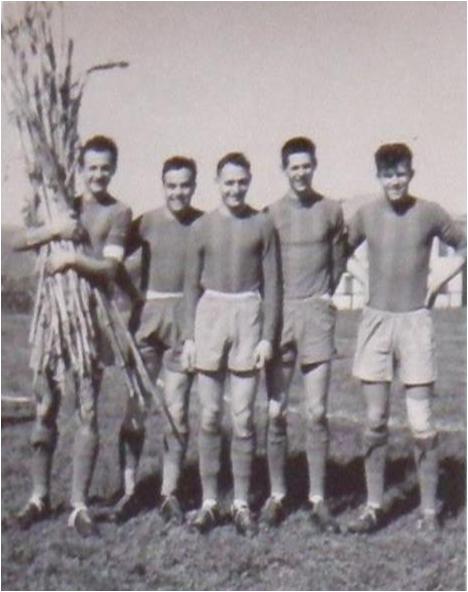 Gruppo di giocatori dell'AC Gozzano negli anni 1950